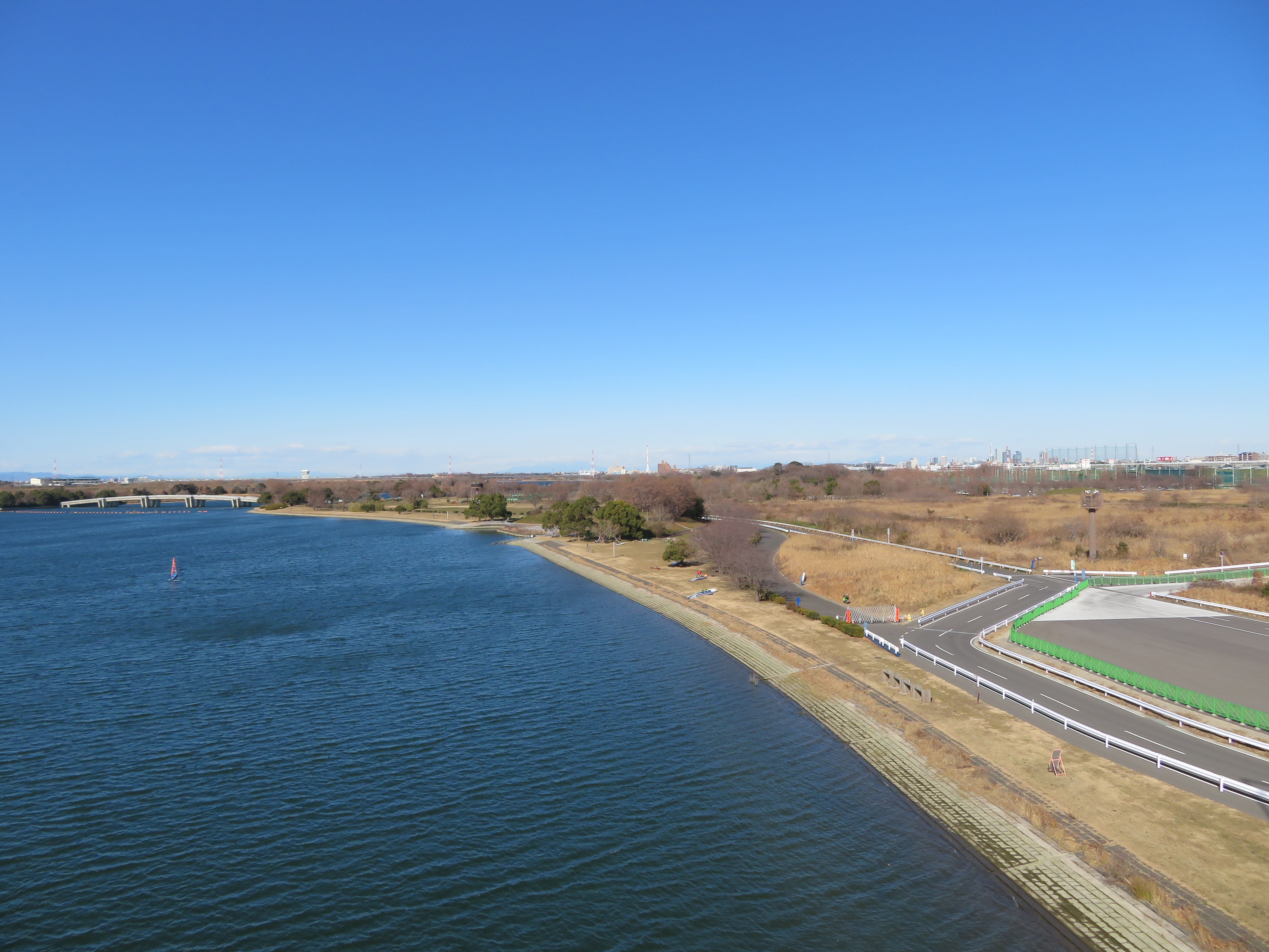 埼玉県戸田市に所在する彩湖・道満グリーンパーク（彩湖と公園遠景を国道298号線幸魂大橋から撮影） Canon PowerShot SX720 HS